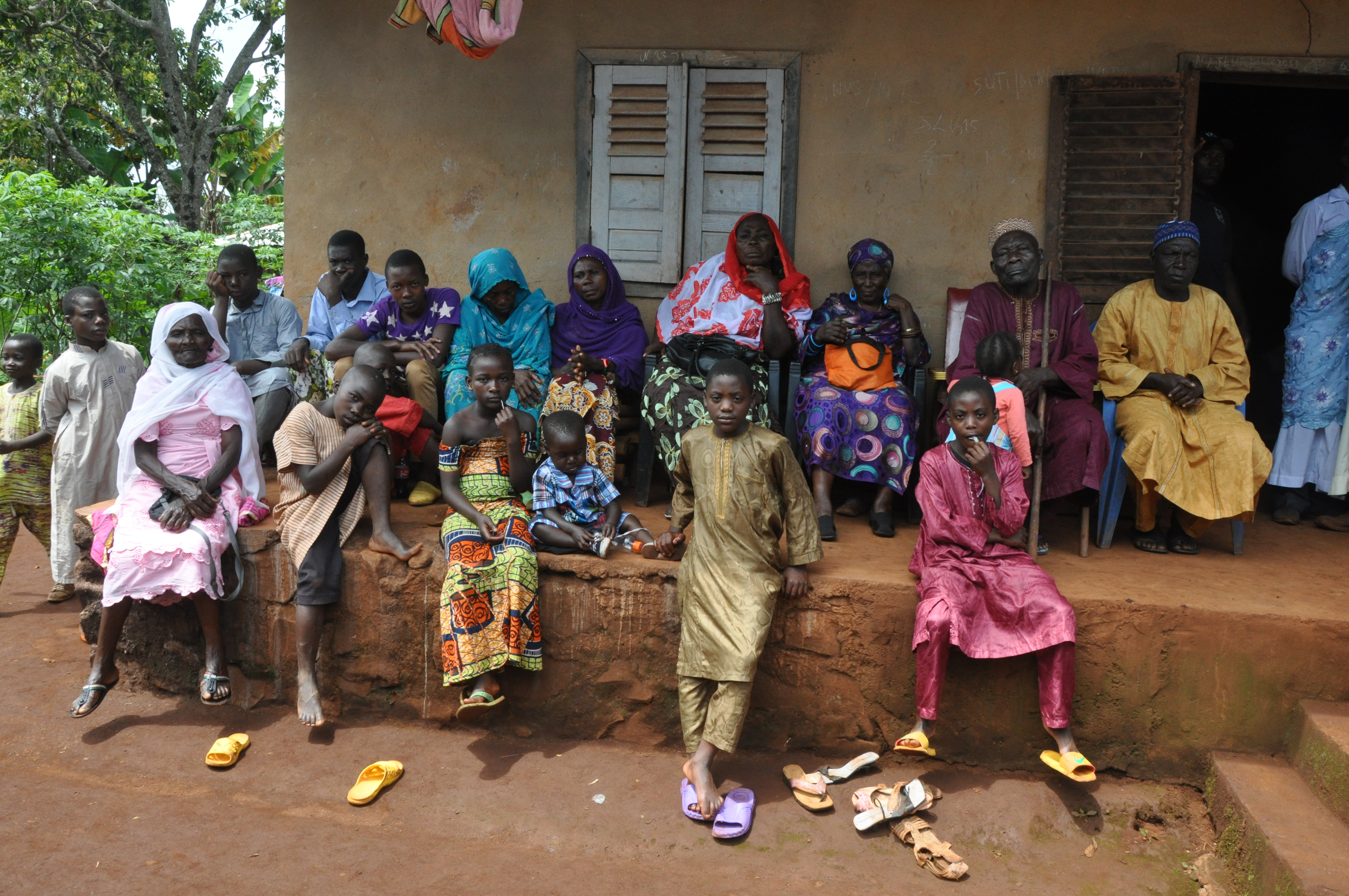 En famille au village... This is an image of Cultural Fashion or Adornment from Cameroon